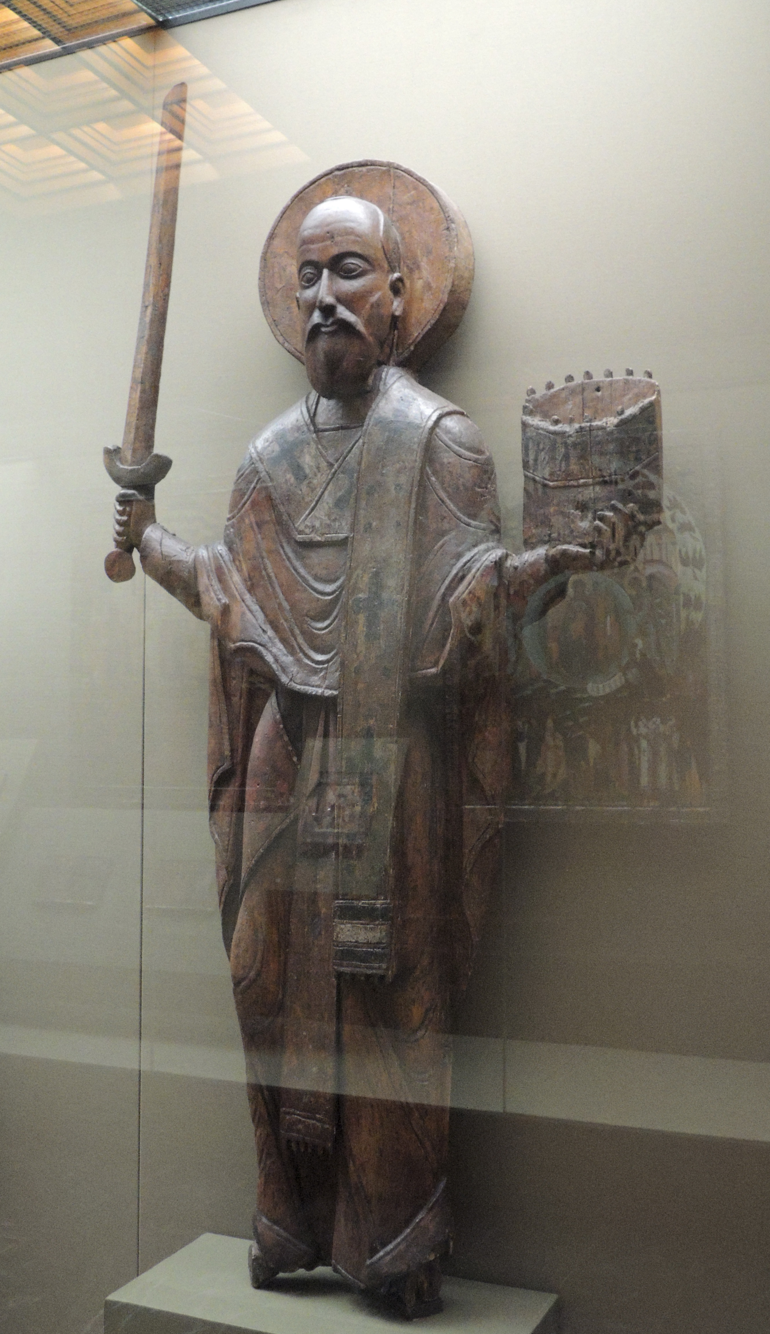 Скульптура "Св. Николай" (Никола Можайский). 14 век. Москва. Дерево, резьба, темпера. ГТГ, инв. 22956